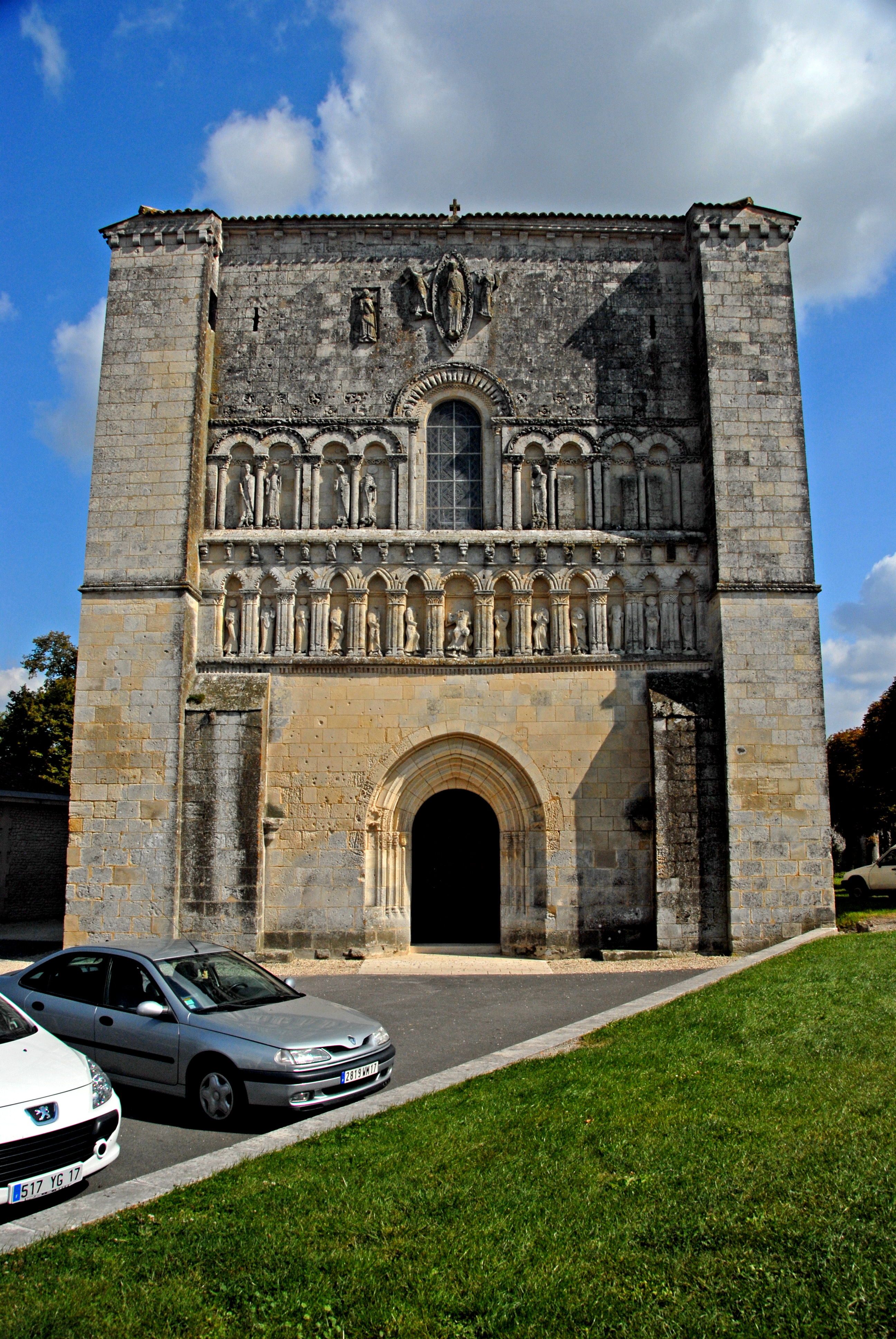 Pfarrkirche Saint-Pierre-de-Pérignac, Fassade